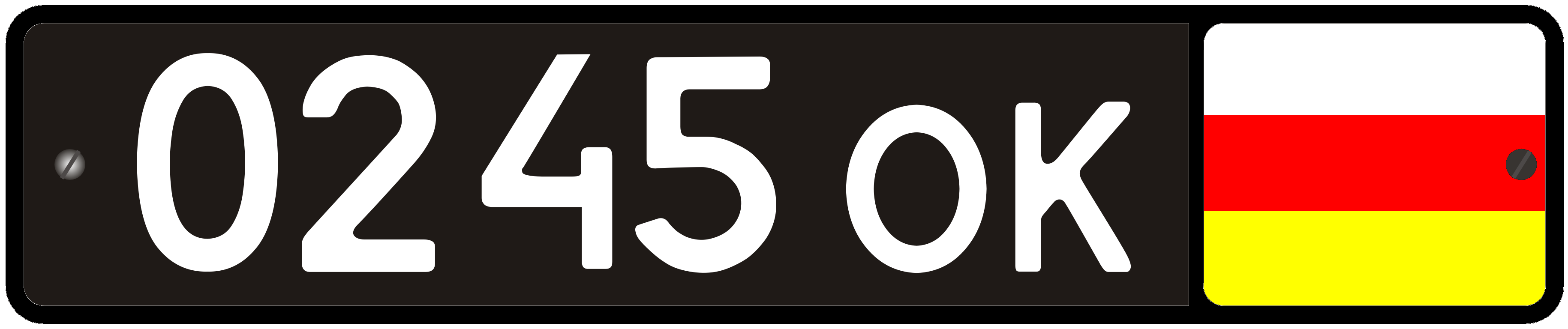 Автомобильный номер МО Южной Осетии